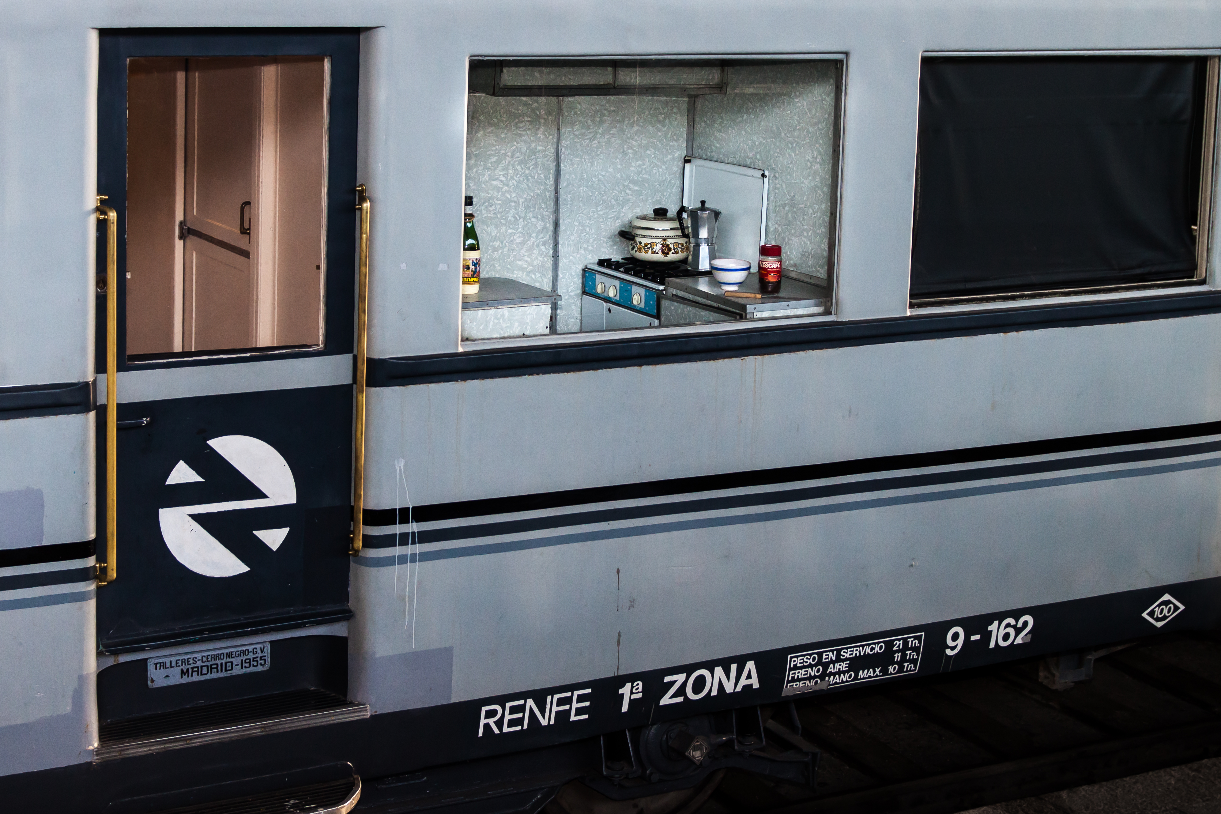 Tren automotor diésel 9162 (Material Móvil y Construcción S.A., España, 1935) Expuesto en el Museo del Ferrocarril, Madrid.